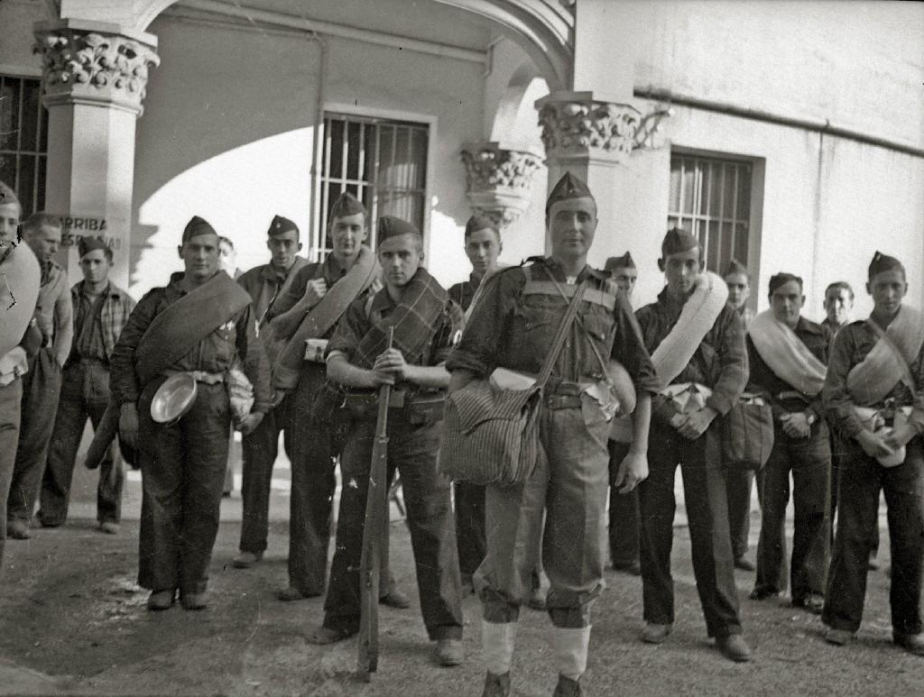 Título original: Recibimiento a las tropas del bando nacional (22/34) Localización: San Sebastián (Guipúzcoa)